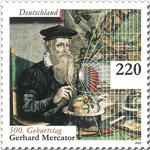 500. Geburtstag Gerhard Mercator